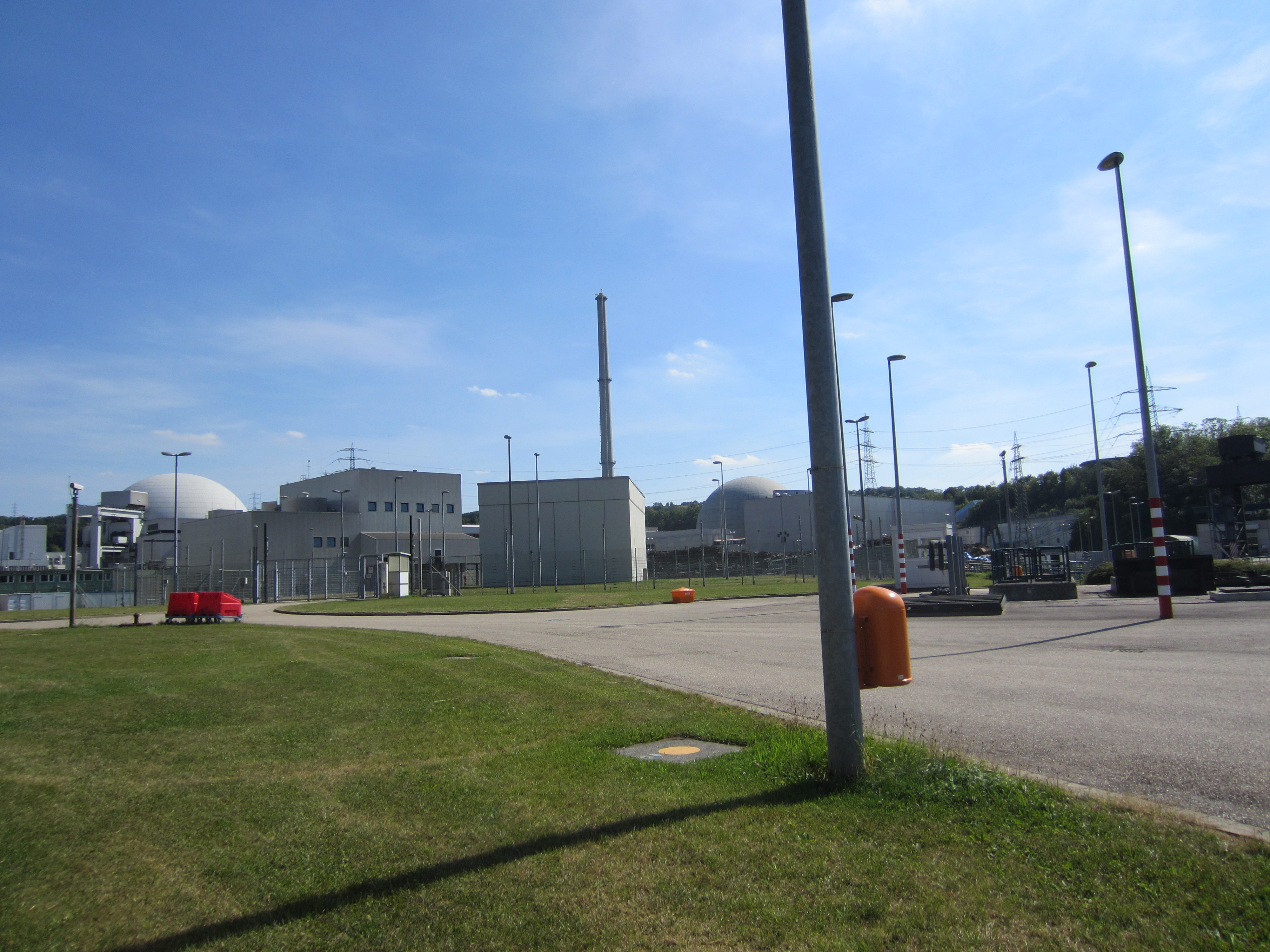 Kernkraftwerk Neckarwestheim